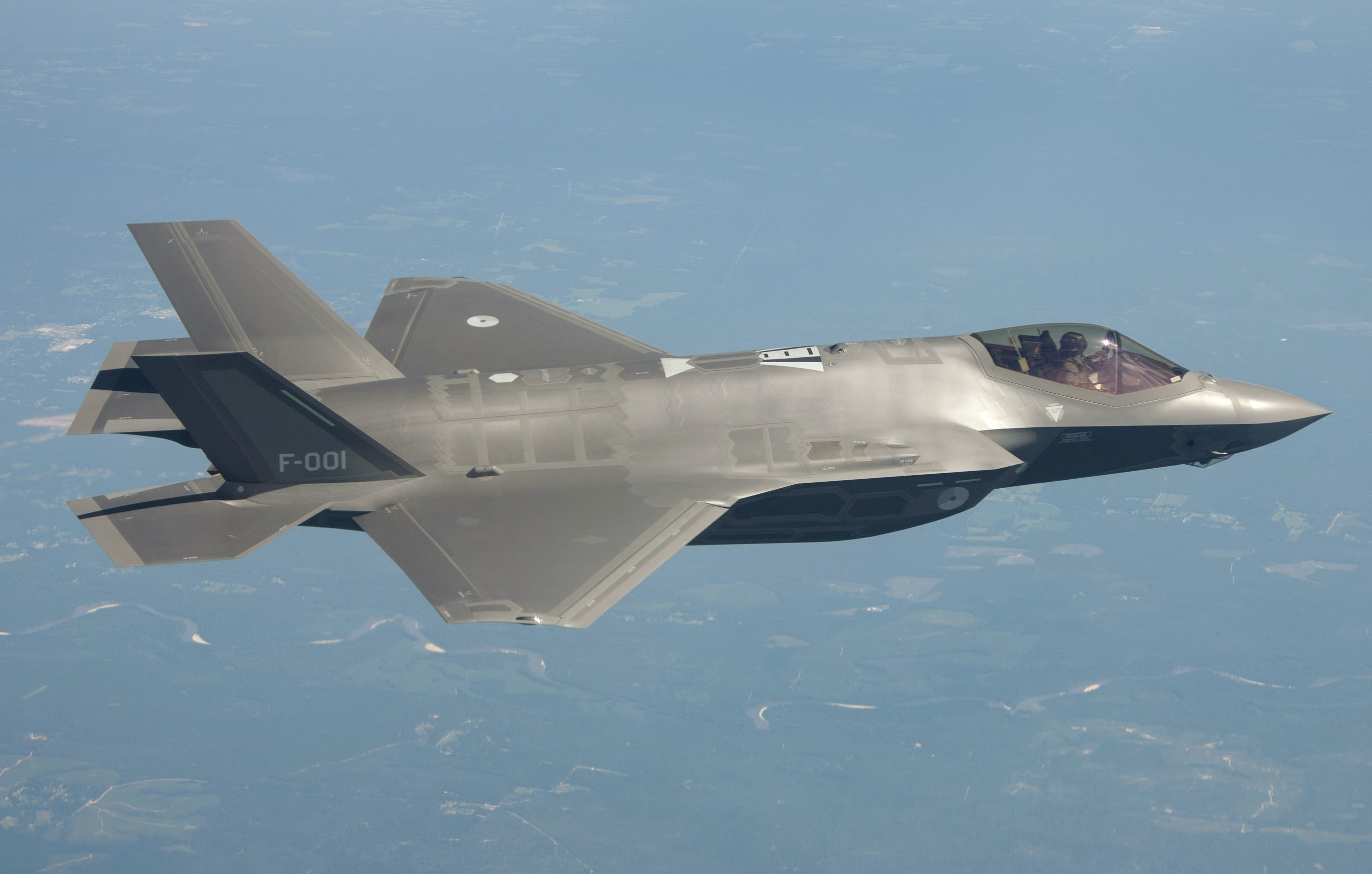 De F-35 Lightning II in de lucht.